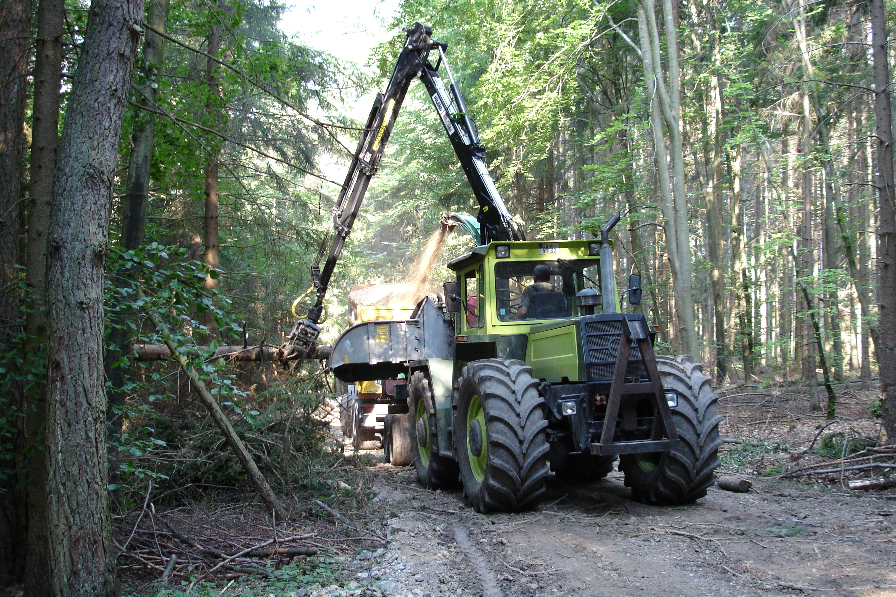 MB trac 1500 im Forsteinsatz mit Igland-Kran und Mus-Max-Holzhäcksler Wood Terminator 8, Deutschland